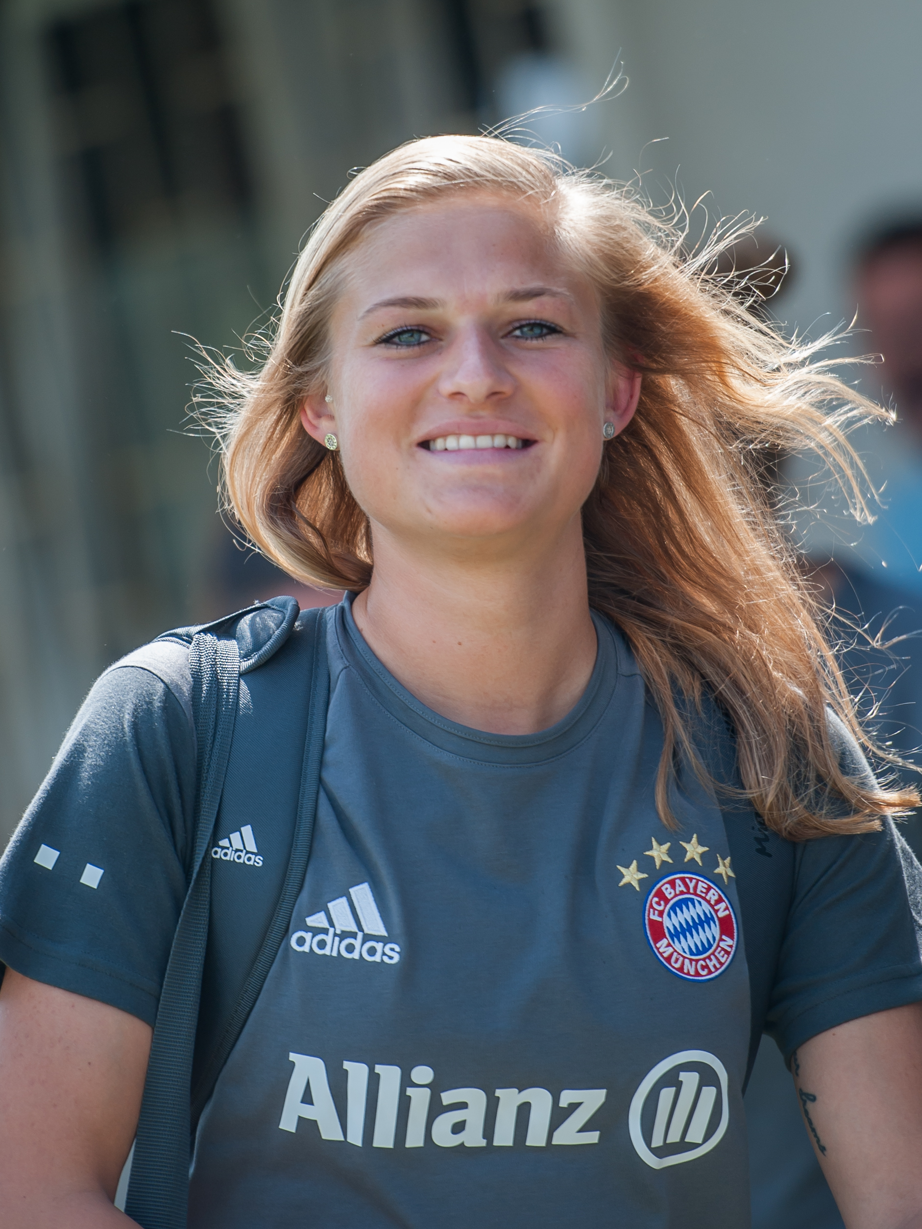 Testspiel SKN St. Pölten vs FC Bayern München am 23. Juli 2016 in Spillern. Bild zeigt Carina Wenninger (Bayern Muenchen).